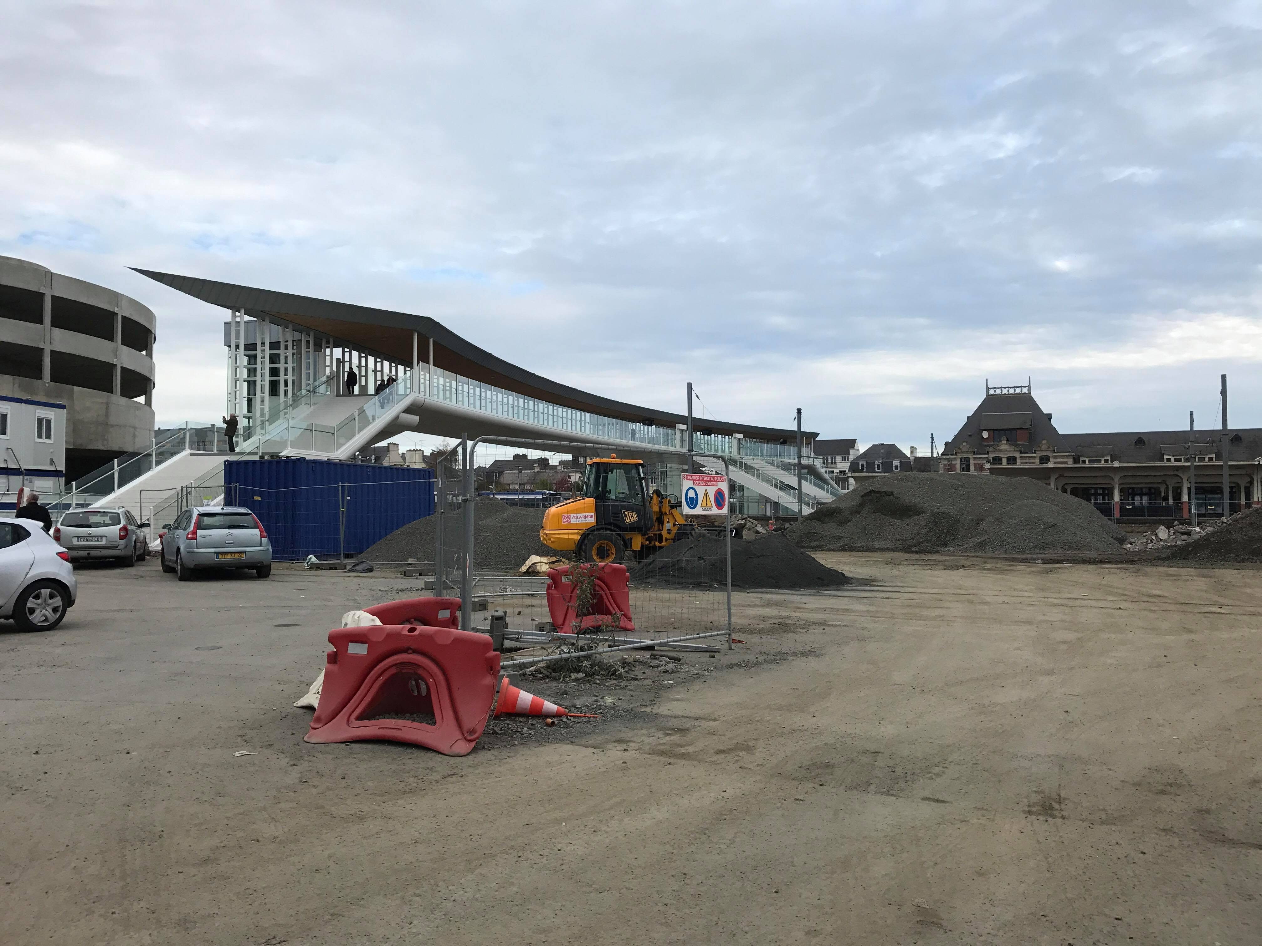 Pôle d'échanges multimodal de Saint-Brieuc, département des Côtes-d'Armor, France.